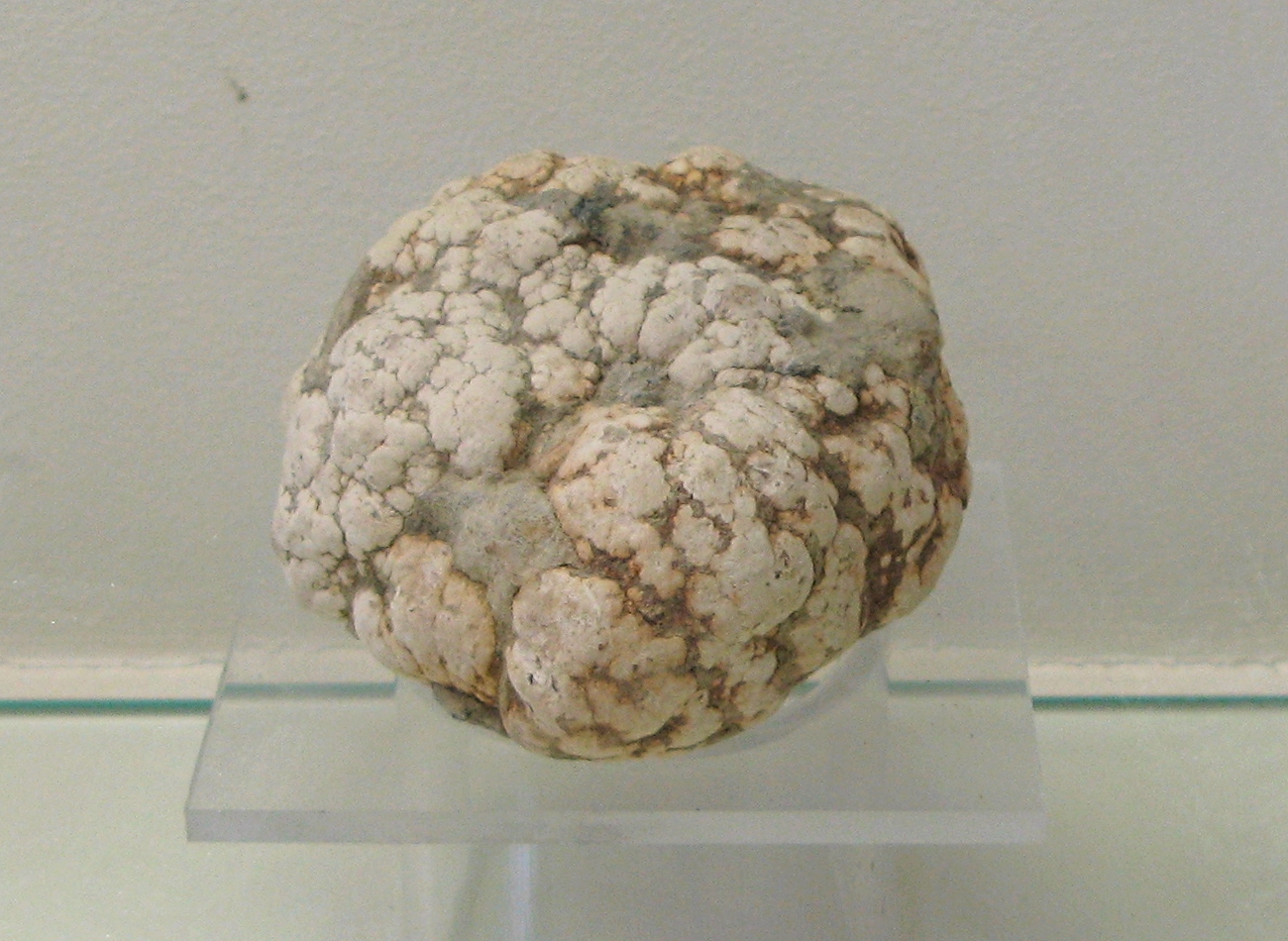 Diadochit - Fundort: Lodenitz,_Böhmen - Ausgestellt im Mineralogischen Museum Bonn